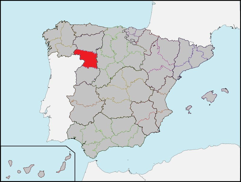 Ubicación de la provincia de Zamora en la España de los años treinta